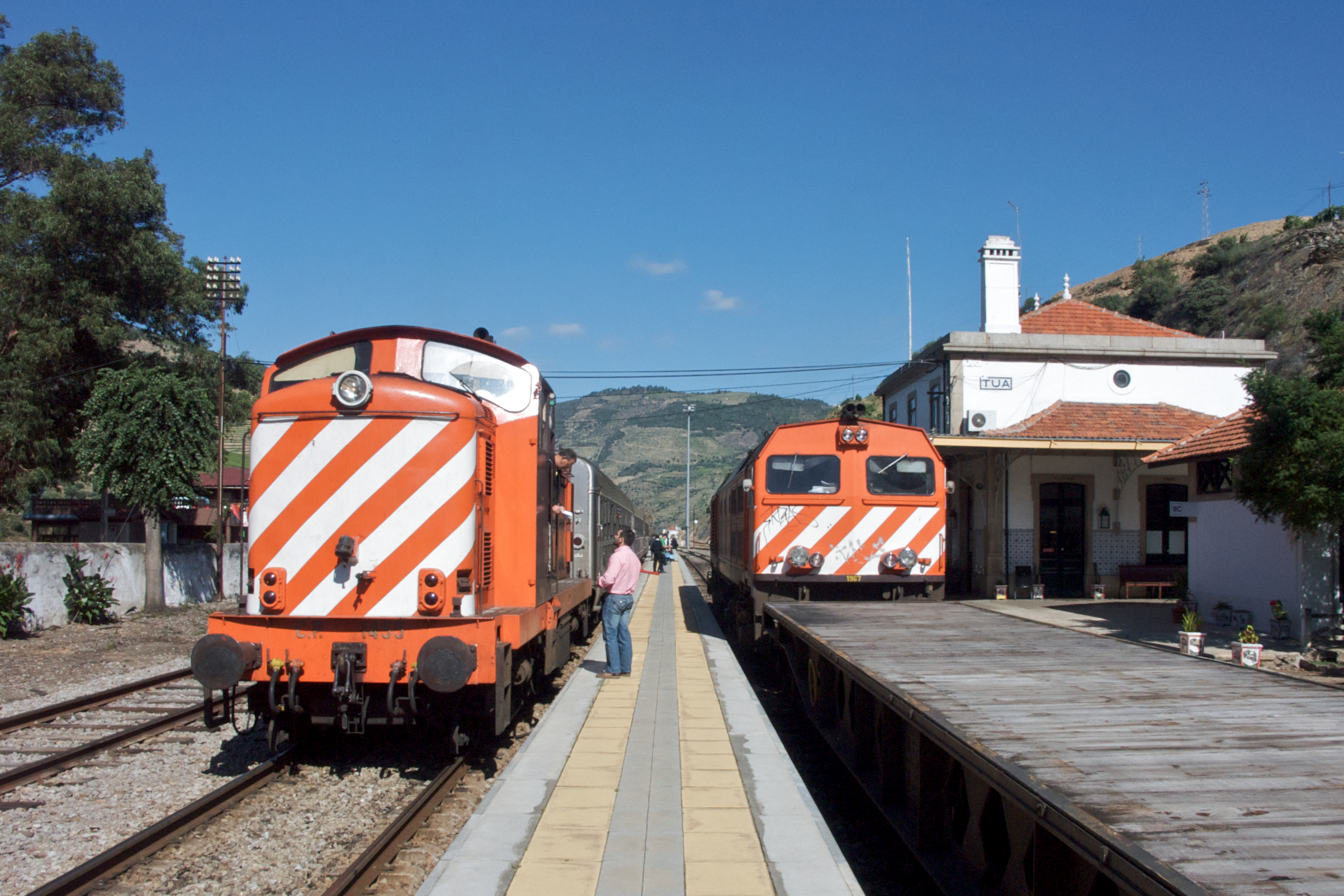 Tipo: Comboio InterRegional 861 [Porto • Campanhã - Pocinho] Local: Estação do Tua [Linha do Douro, PK 139 • Linha do Tua, PK 0,0] Data e hora: 17 de Junho de 2008 [09h55] Material: Locomotiva 1455 + 3 carruagens Sorefame cruzamento com o Comboio de Distribuição 75230 (material vazio) [Pocinho - Vila Nova de Gaia] (Locomotiva 1967 + 8 vagões CP Rlps)